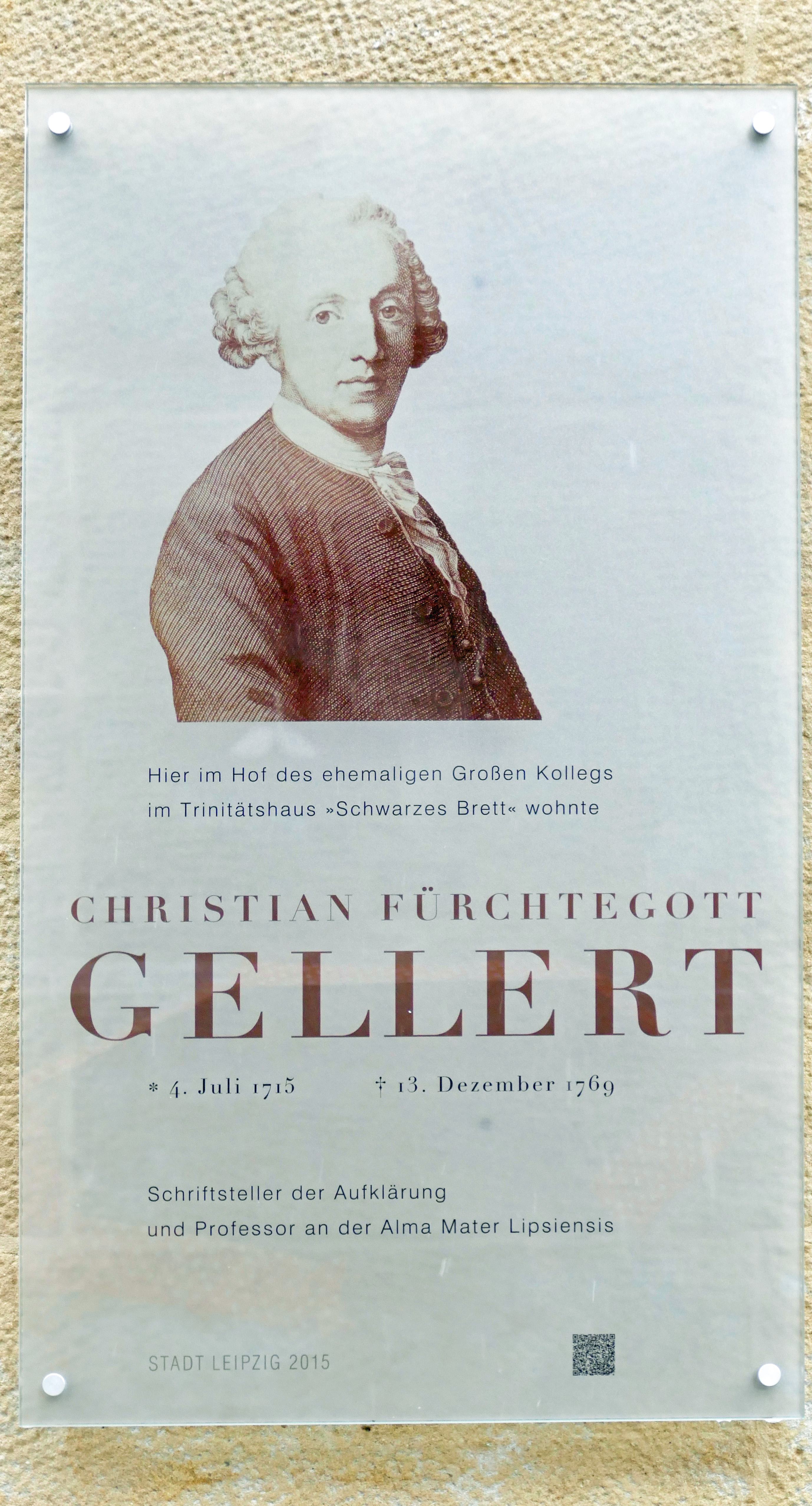 Hinweisschild in der Ritterstraße Leipzig: Hier wohnte Christian Fürchtegott Gellert im Hof des ehemaligen Großen Kollegs im Trinitätshaus "Schwarzes Brett".